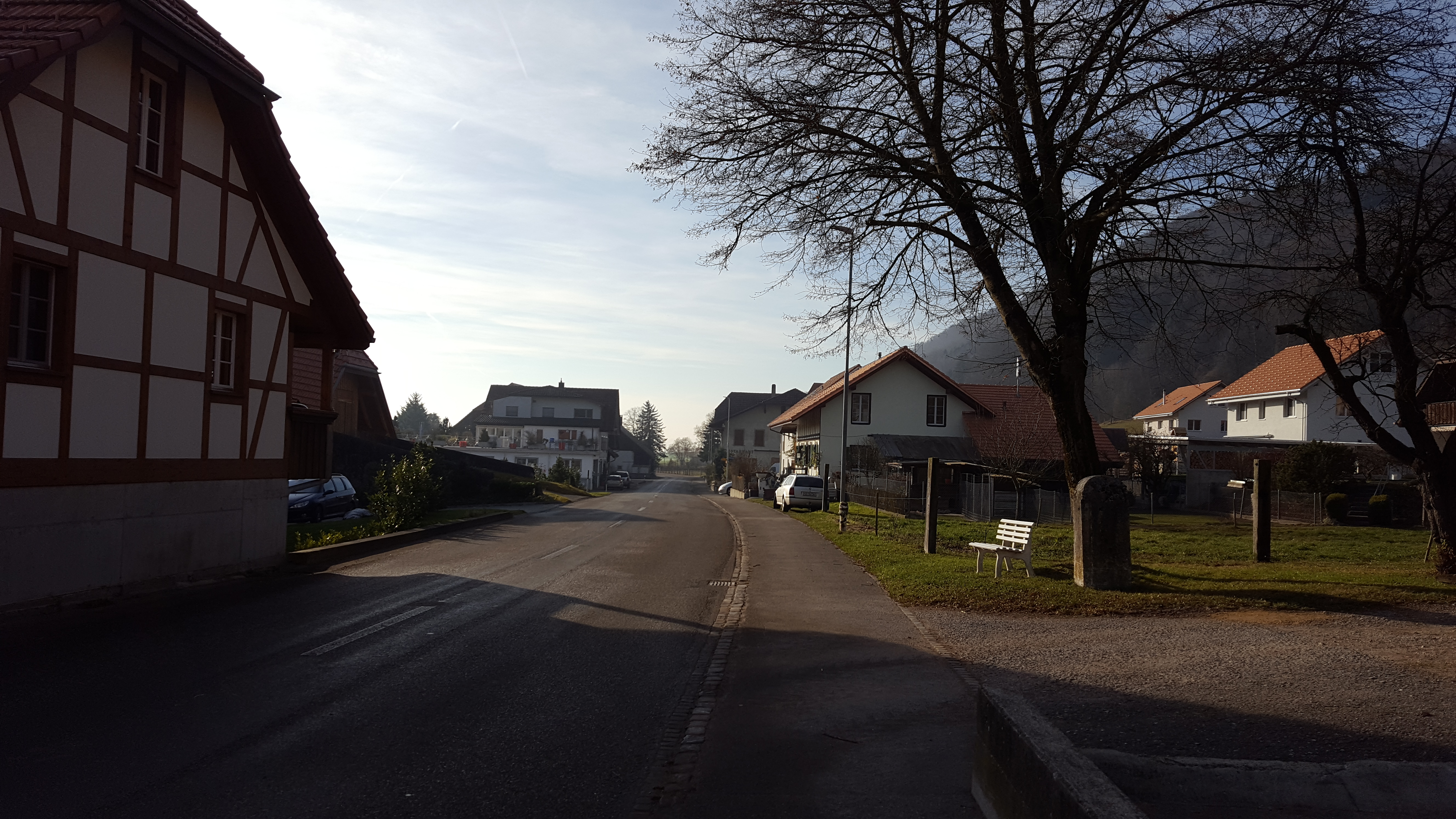 Oberramsern, Blick Richtung Messen